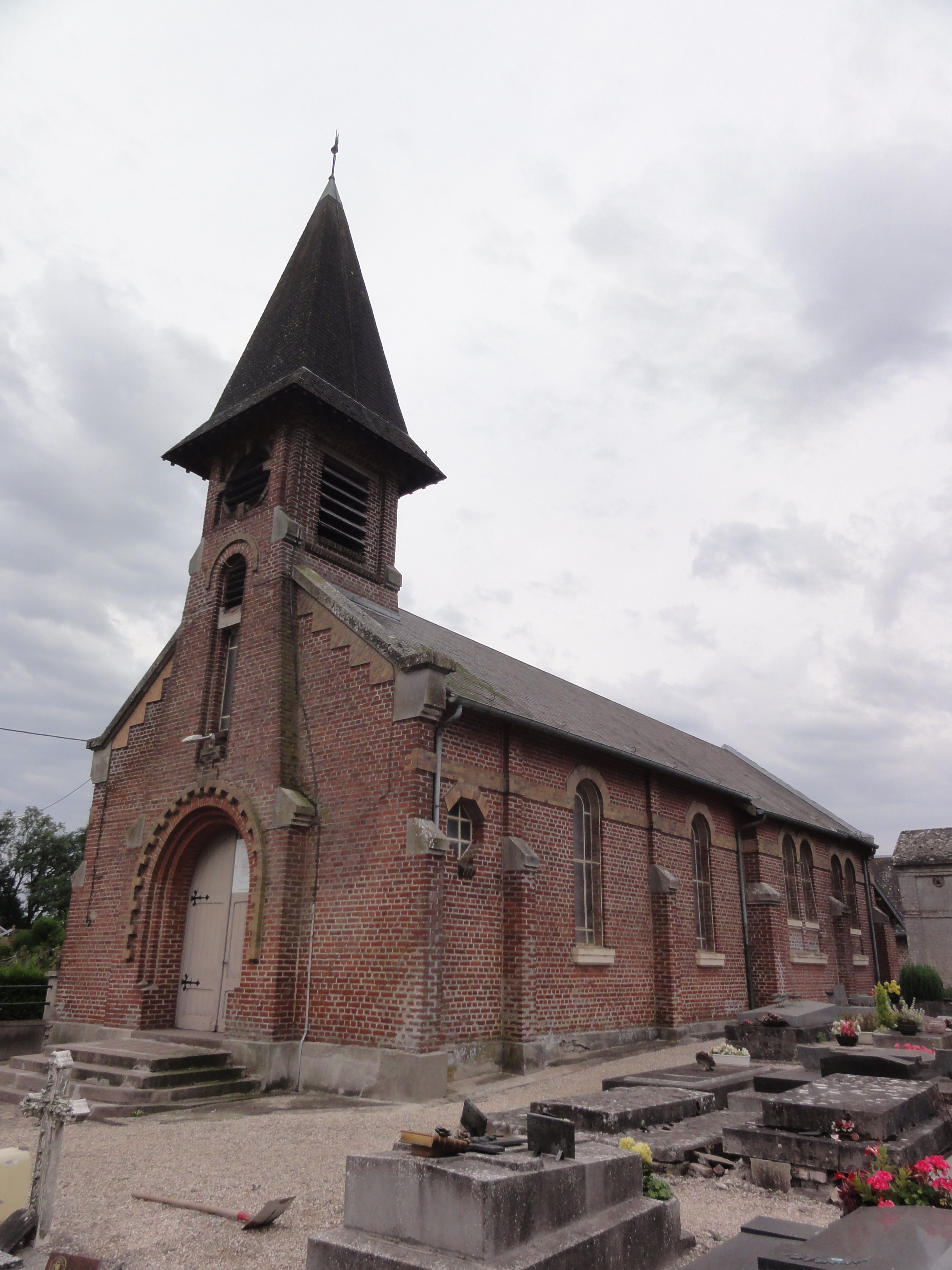 Sequehart (Aisne) église